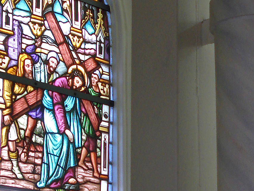 Vitral na Capela do Santo Sepulcro, Caxias do Sul, Brasil.